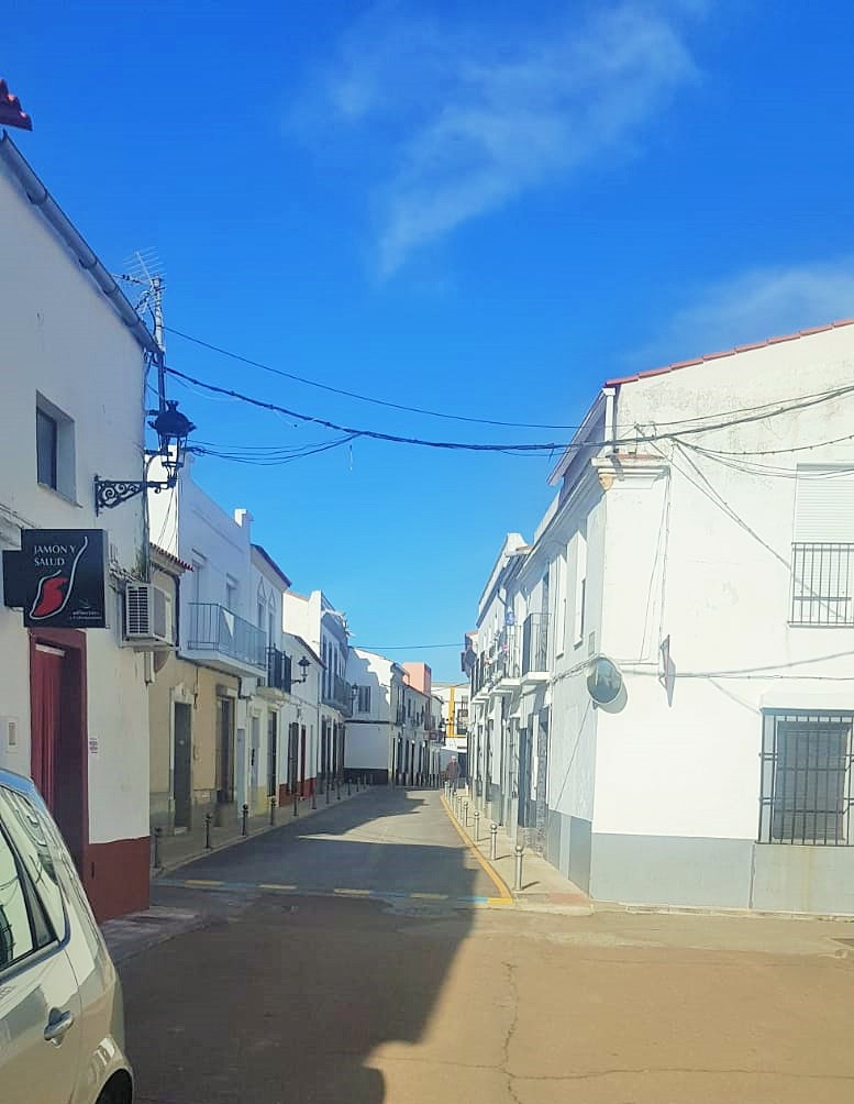 La Morera